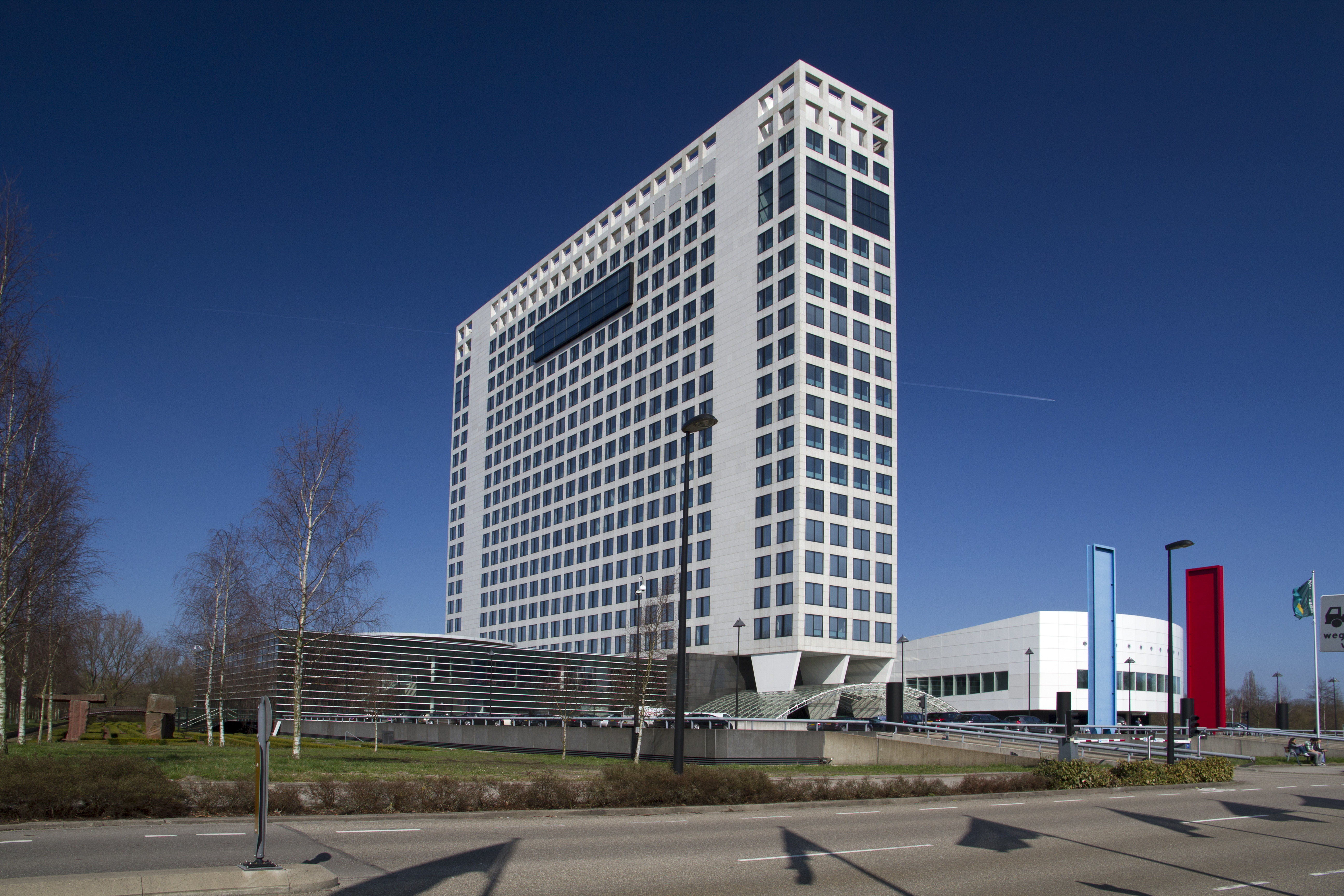 provinciehuis Utrecht Archimedeslaan 6, 3584 BA Utrecht